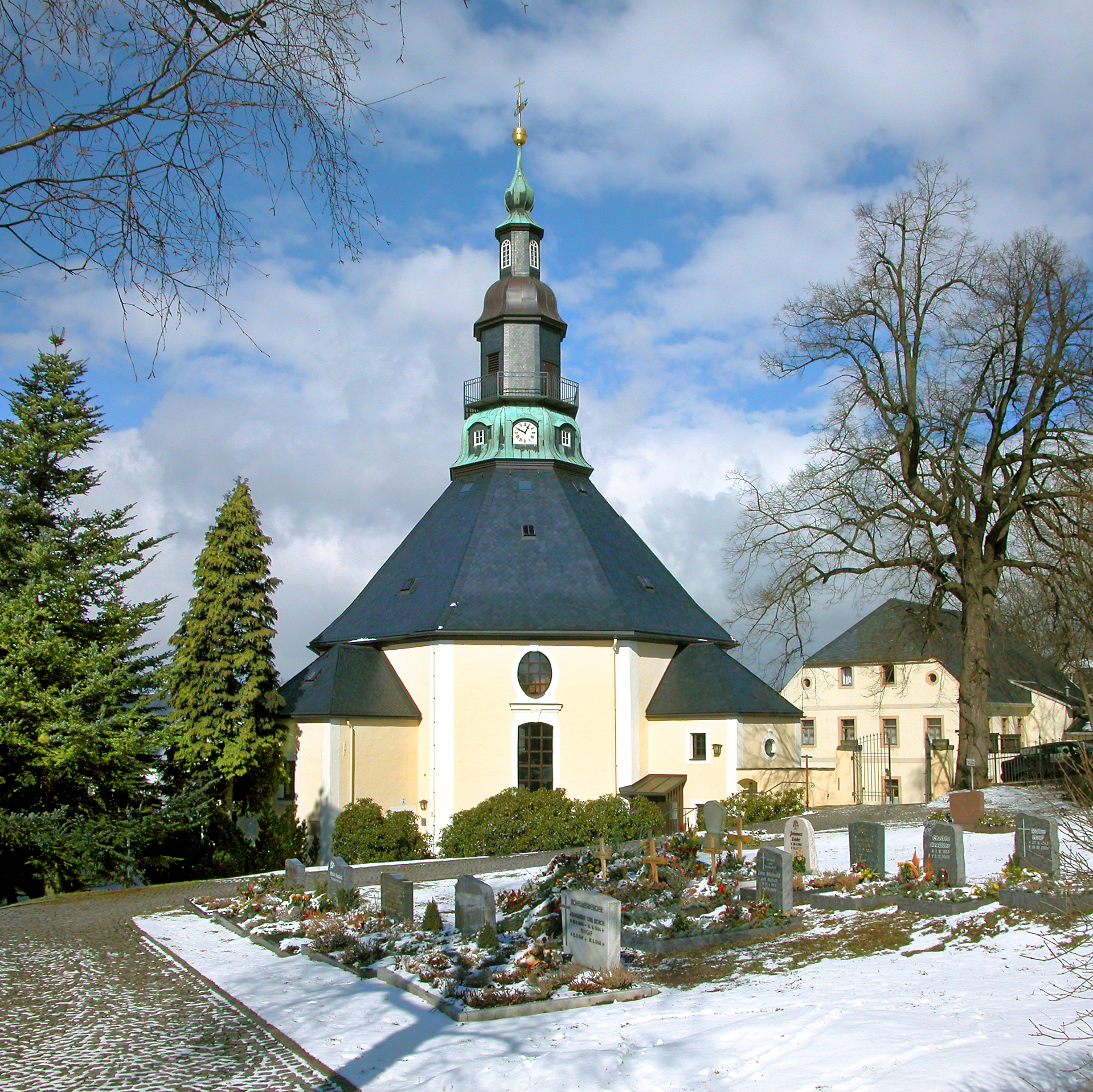 05.03.2008 09548 Kurort Seiffen, Deutschneudorfer Straße 3 (GMP: 50.647219,13.451524): Evangelisch-Lutherische Bergkirche Seiffen. Achteckiger barocker Zentralbau (1779), errichtet nach Plänen von Christian Gotthelf Reuther. [DSCN31680-31681.TIF]20080305010MDR.JPG(c)Blobelt